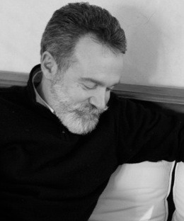 Portrait de Michel Orcel